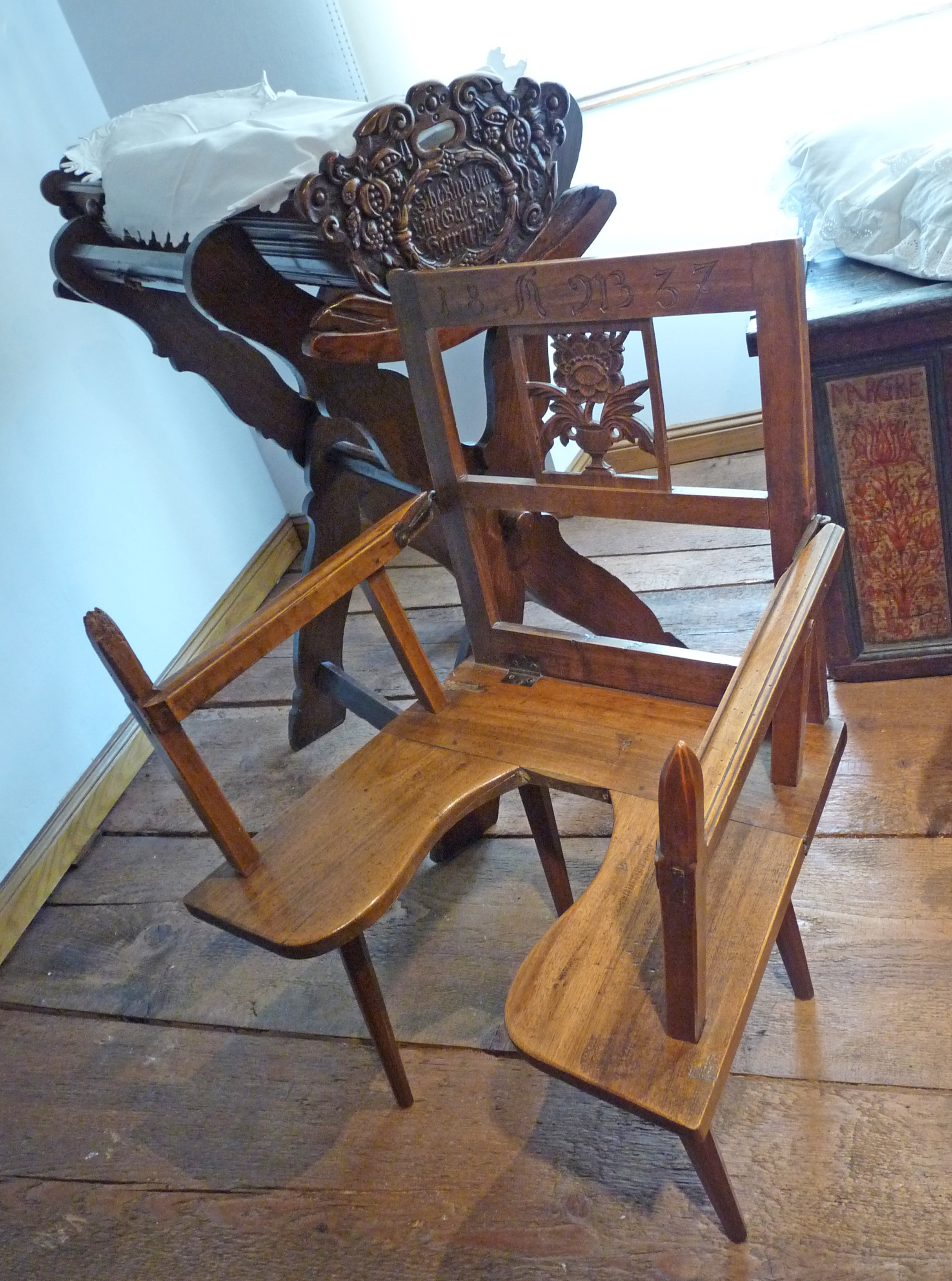 Berceau de baptême daté de 1655 et chaise d'accouchement (fabriquée en 1837 pour Anne Willig, sage-femme à Hurtigheim. Bois de fruitier, accoudoirs démontables et dossier repliable), Musée alsacien de Strasbourg.